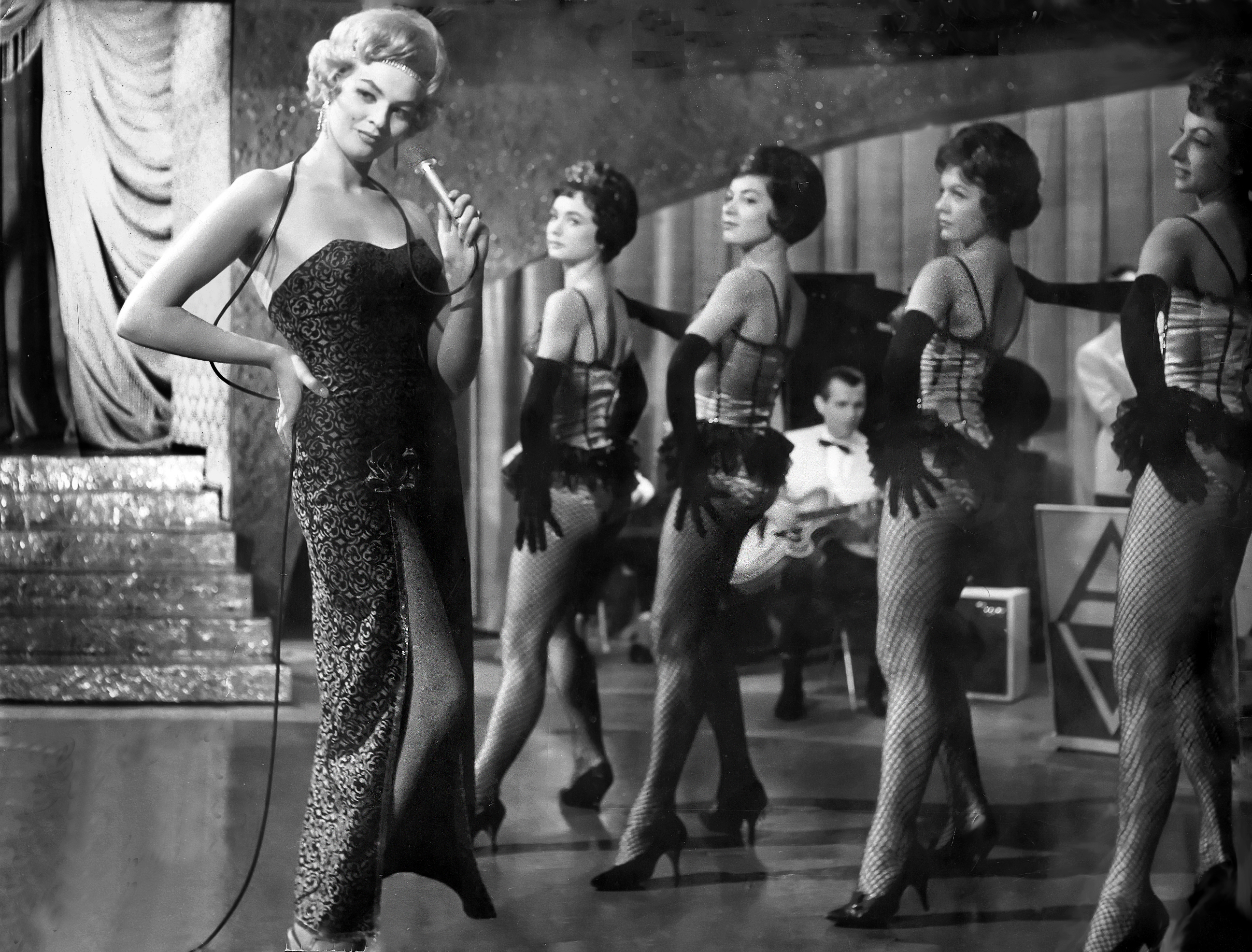 Barbara Modelska w filmie „Gangsterzy i filantropi” (1962), reż. J. Hoffman i E. Skórzewski.